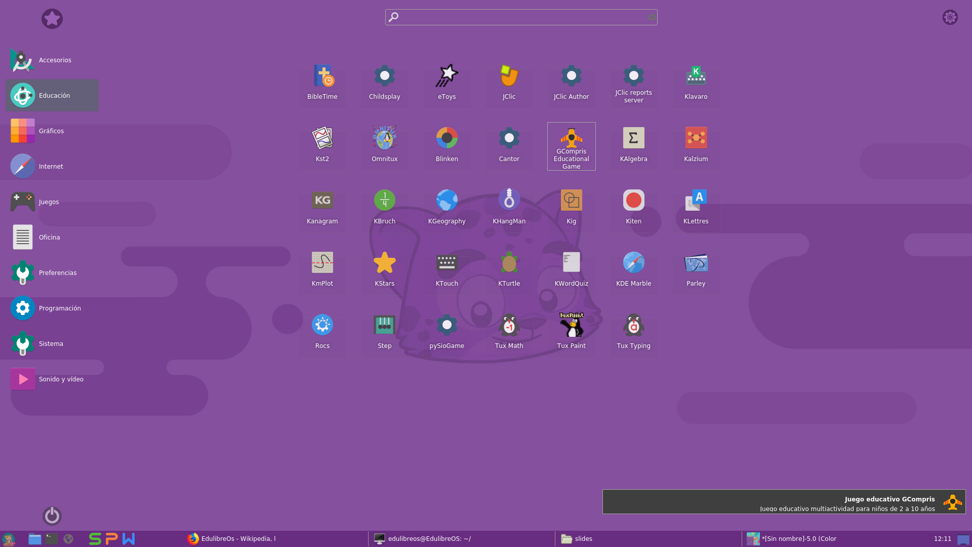 EdulibreOS-V10.0-Launcher